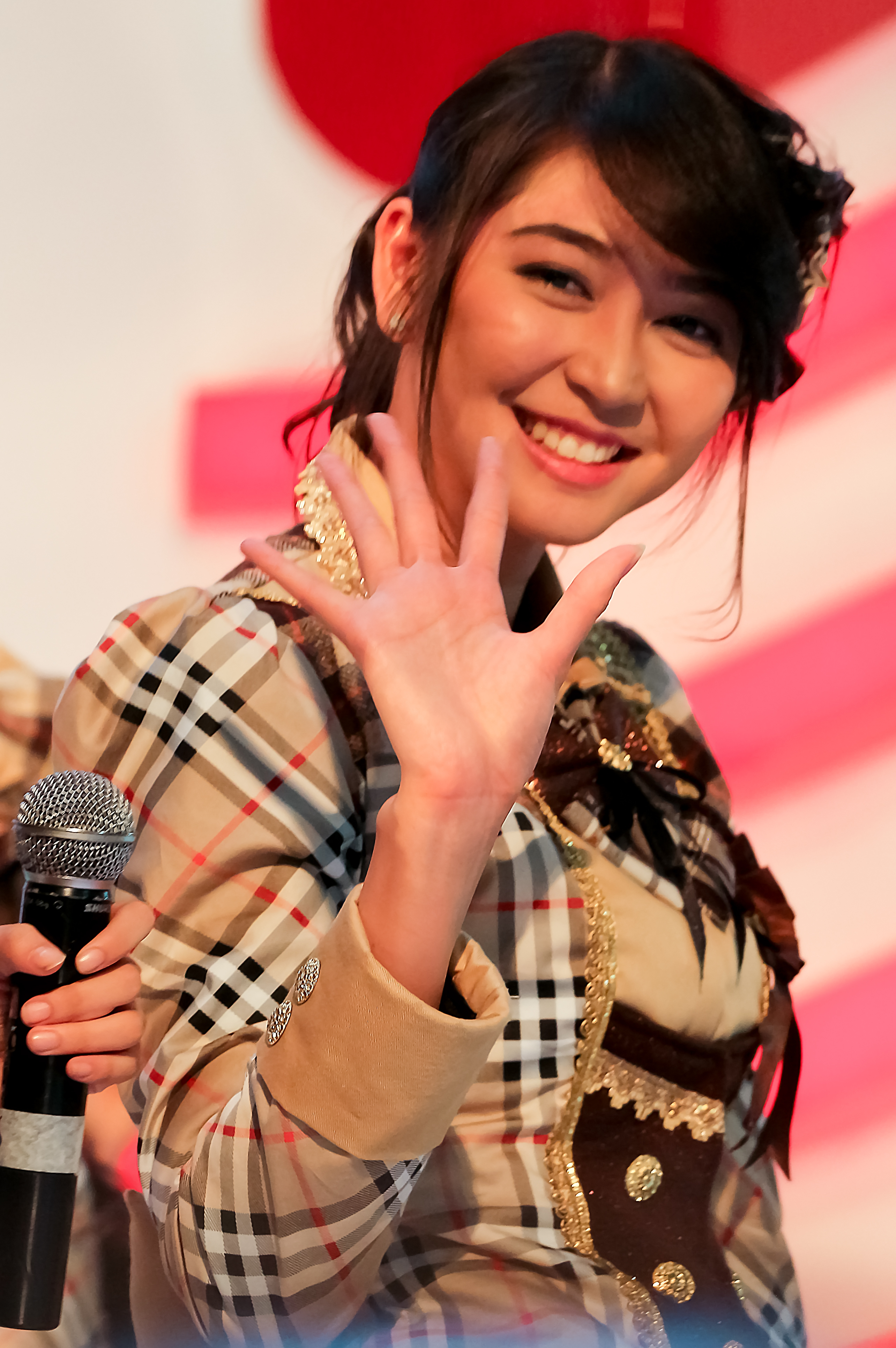 Jessica Veranda